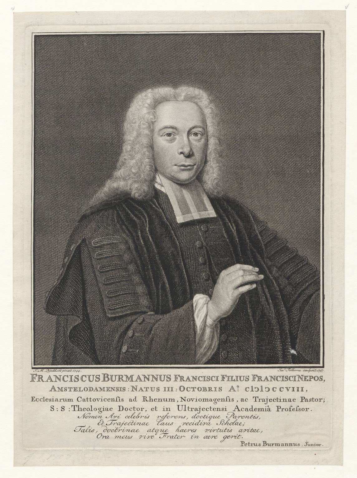 Franciscus Burmannus (Frans Burman III), 1708-1793